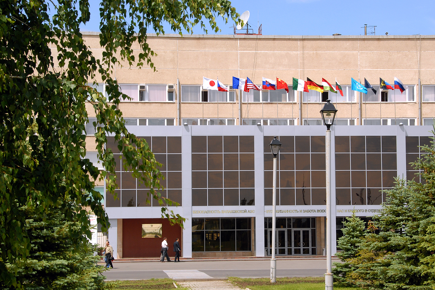 Headquarters Balakovo NPP